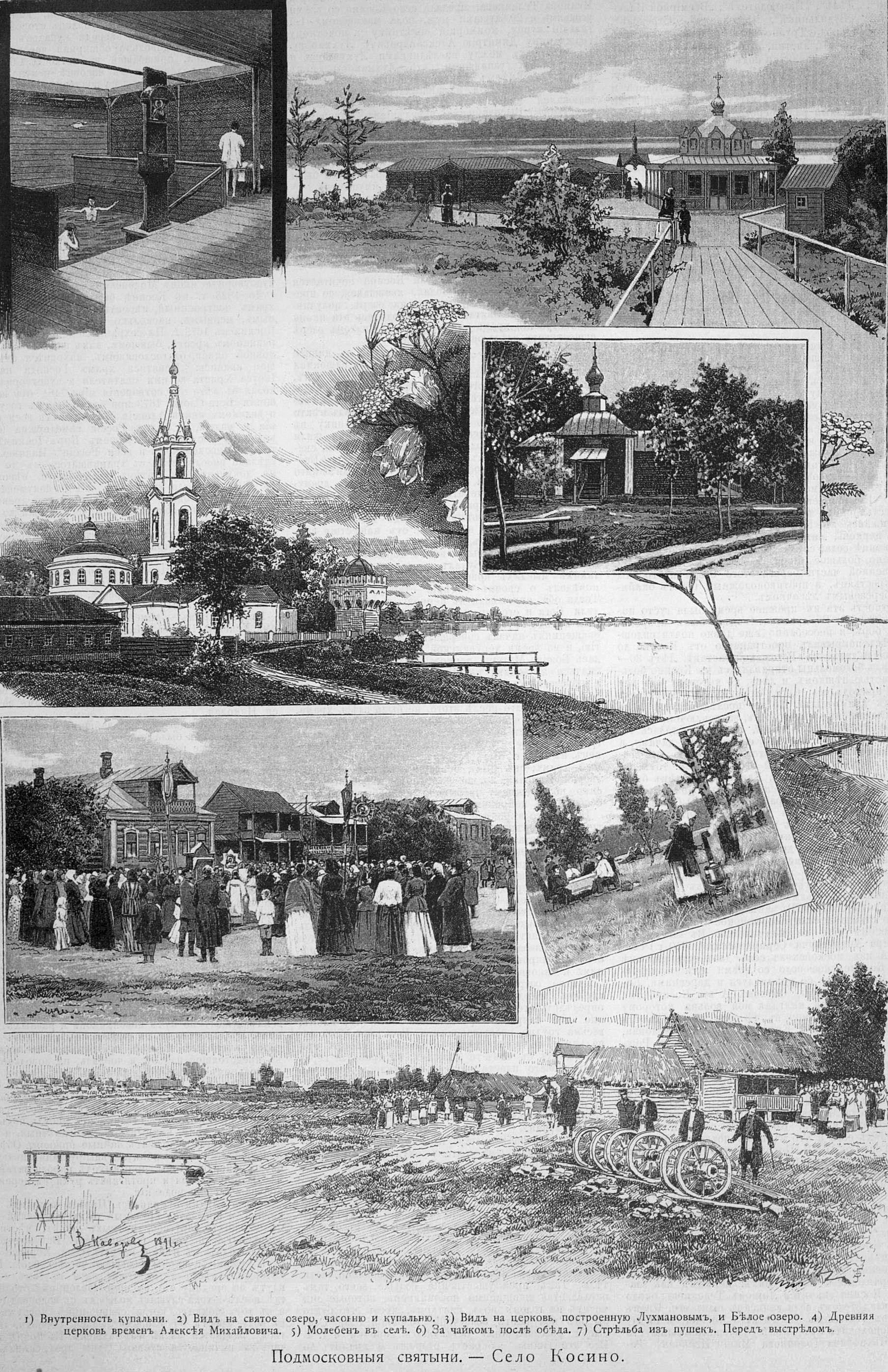 Село Косино, 1891 год